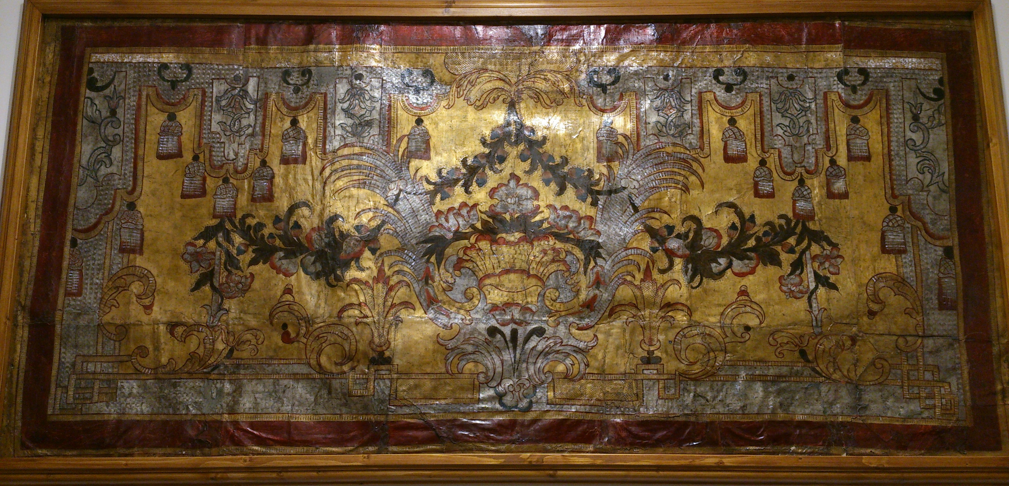 Paliotto in cuoio dorato e dipinto. Cuoio impresso a secco con punzone e ricoperto da lamine in argento meccato e dipinto a tempera.